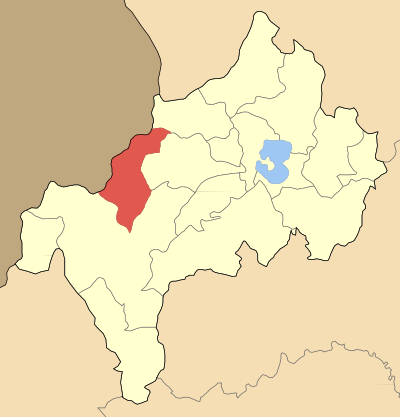 Дем Акритес на картата на Ном Костур, Гърция. Locator map of Akriton municipality (Δήμος Ακριτών) at Kastoria perfecture, Greece).